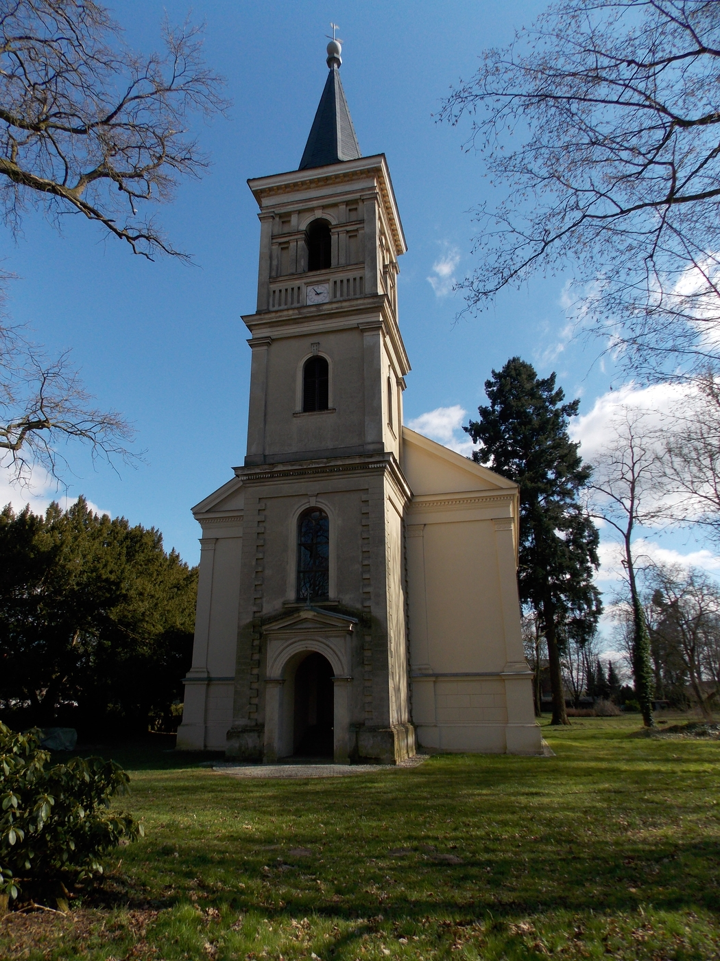 Gutskirche melkof, Kirchturm